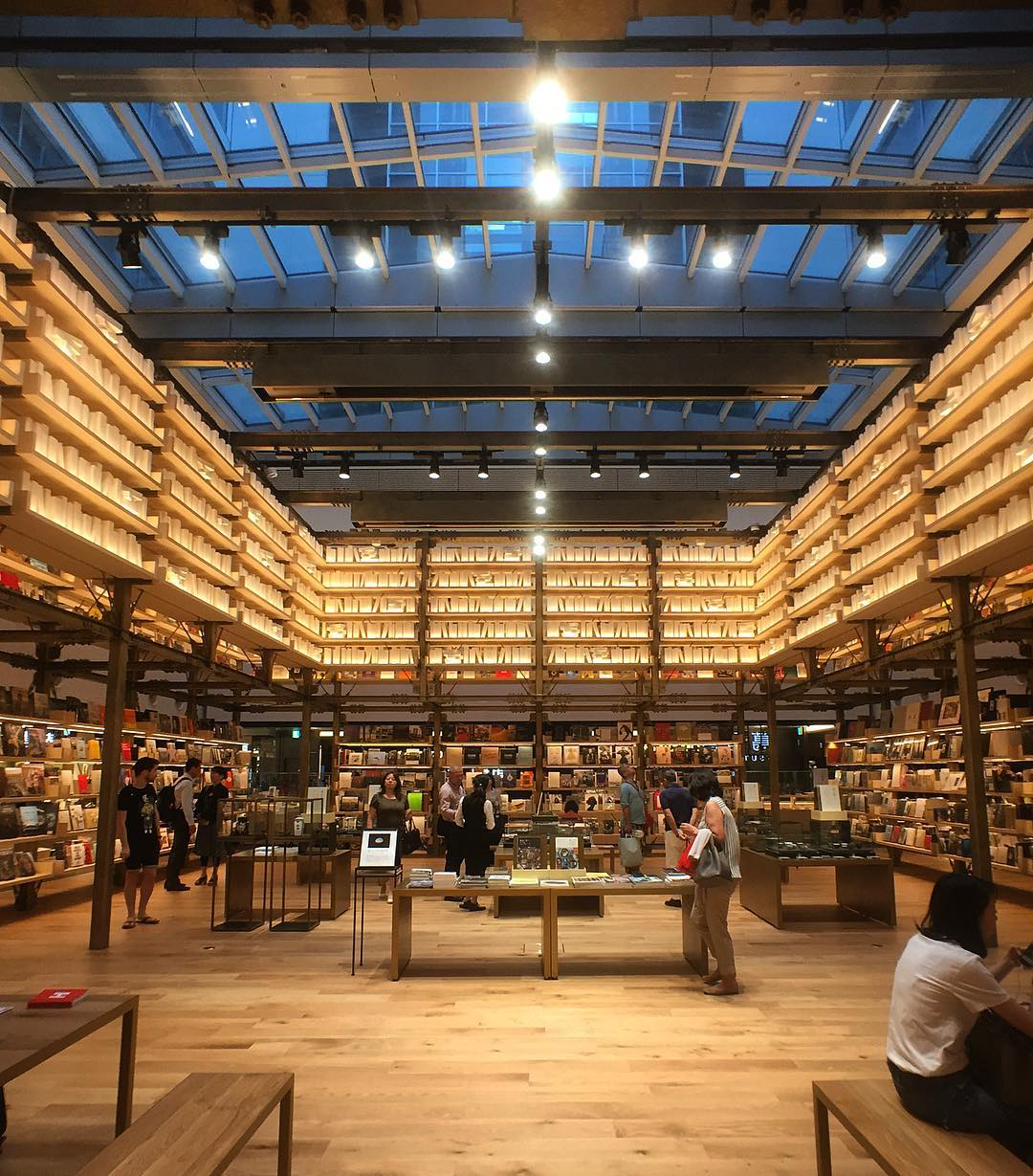 on Instagram ift.tt/2tJ9jaG